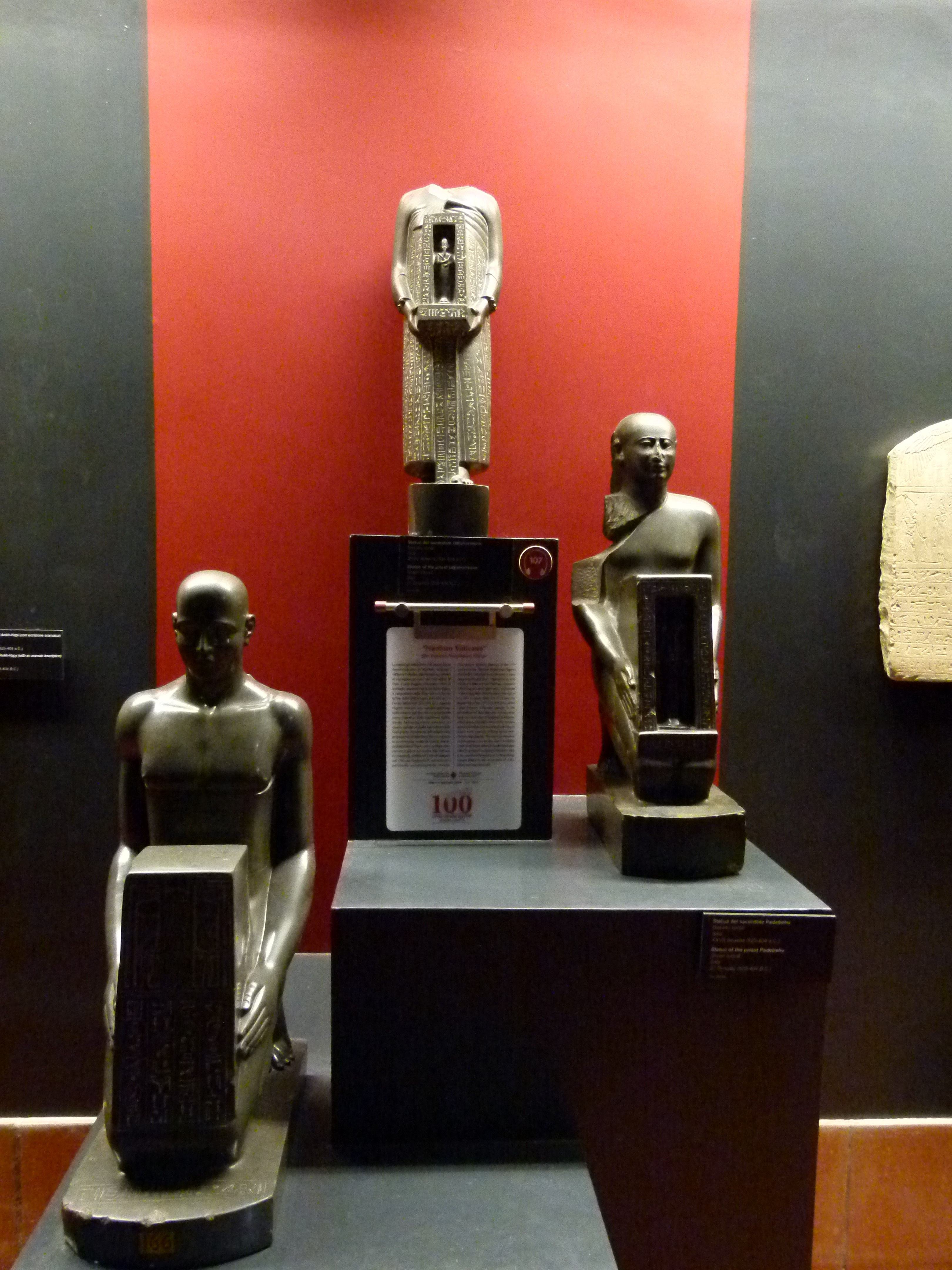 This photo was taken with Panasonic Lumix DMC-FZ100 camera, thanks to Panasonic.You can see all photographs in category: Taken with Panasonic Lumix DMC-FZ100.